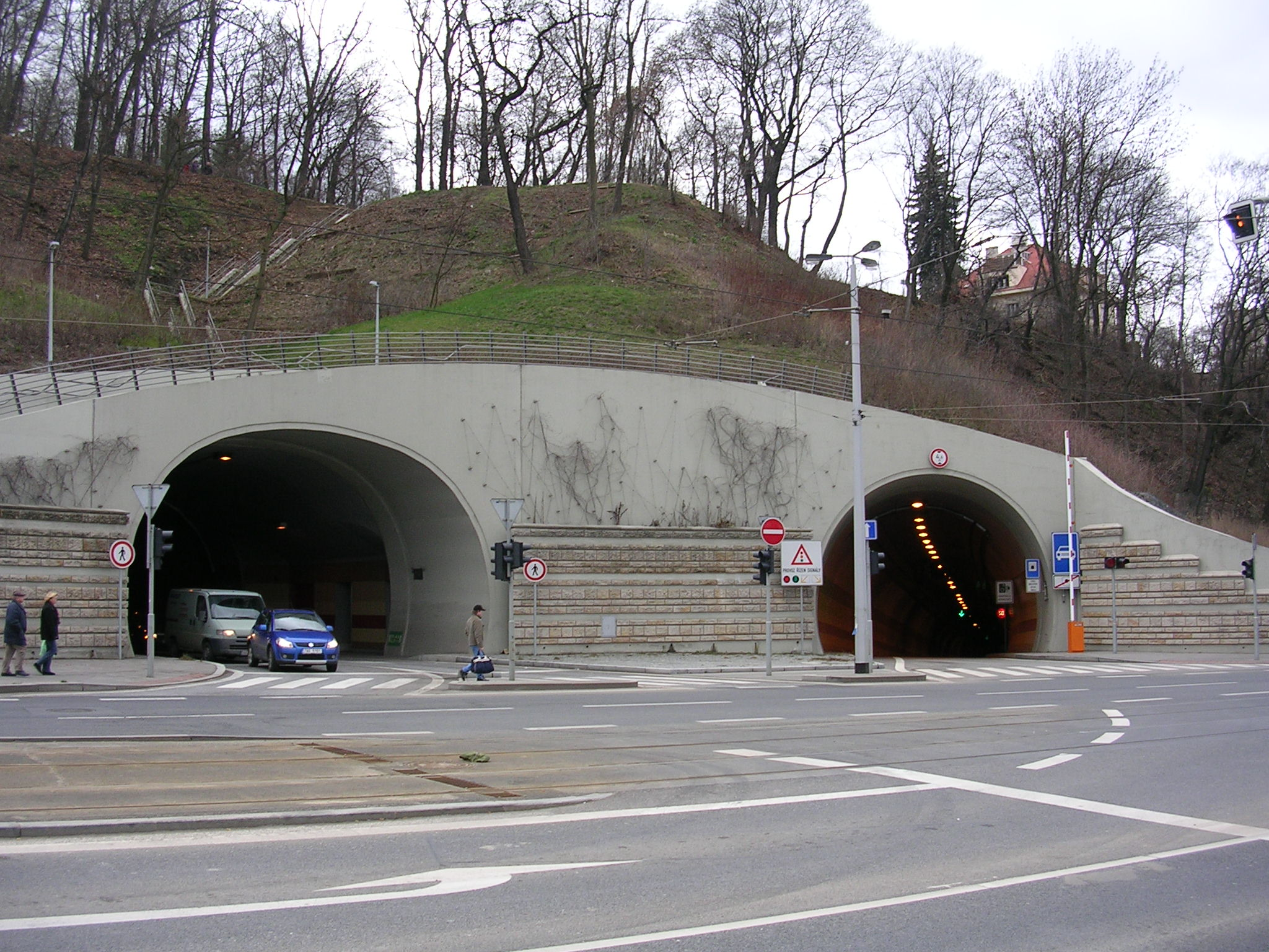 Praha, Smíchov, tunel Mrázovka, vjezd z Radlické ulice